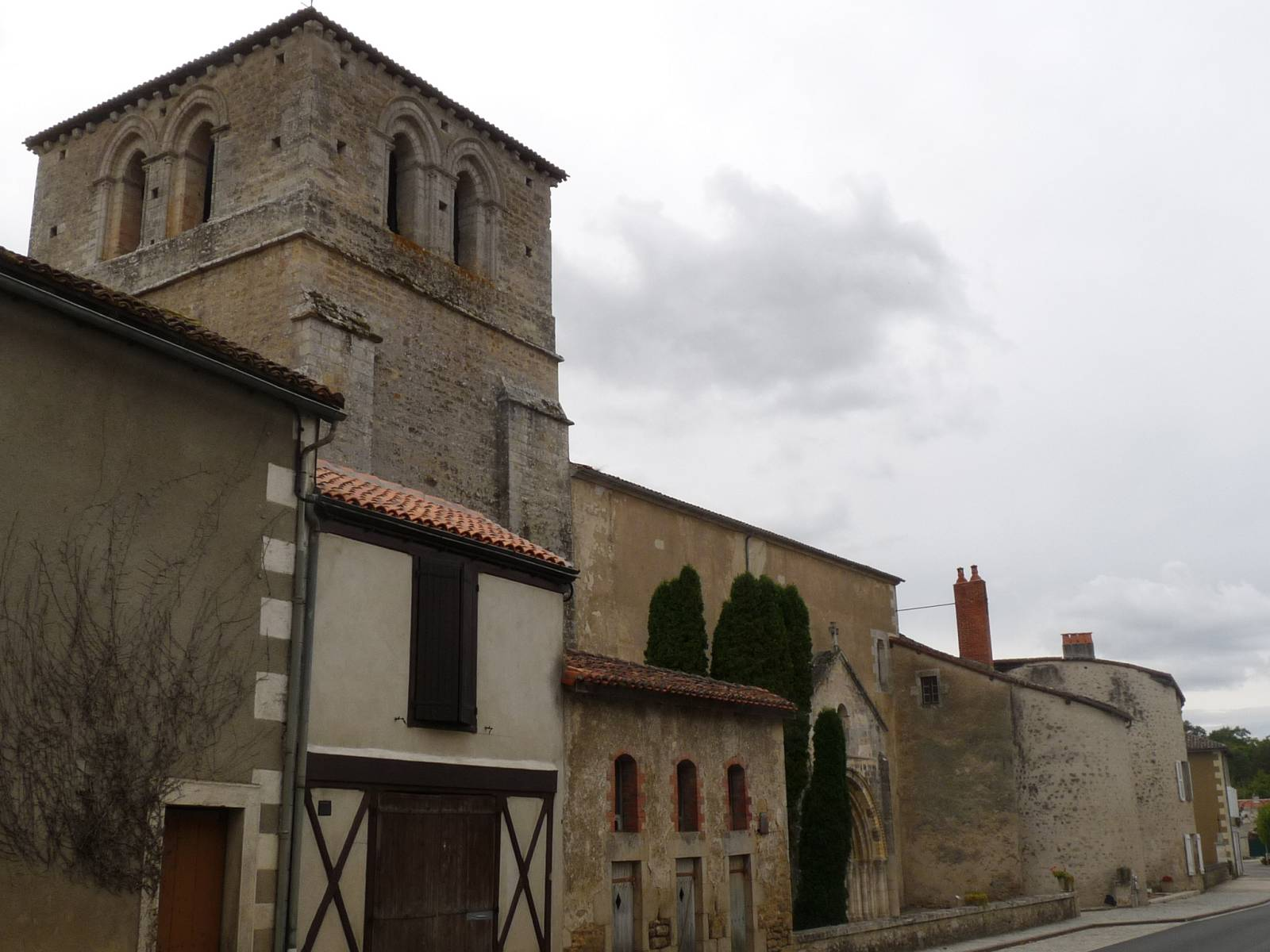 église d'Alloue, Charente, France